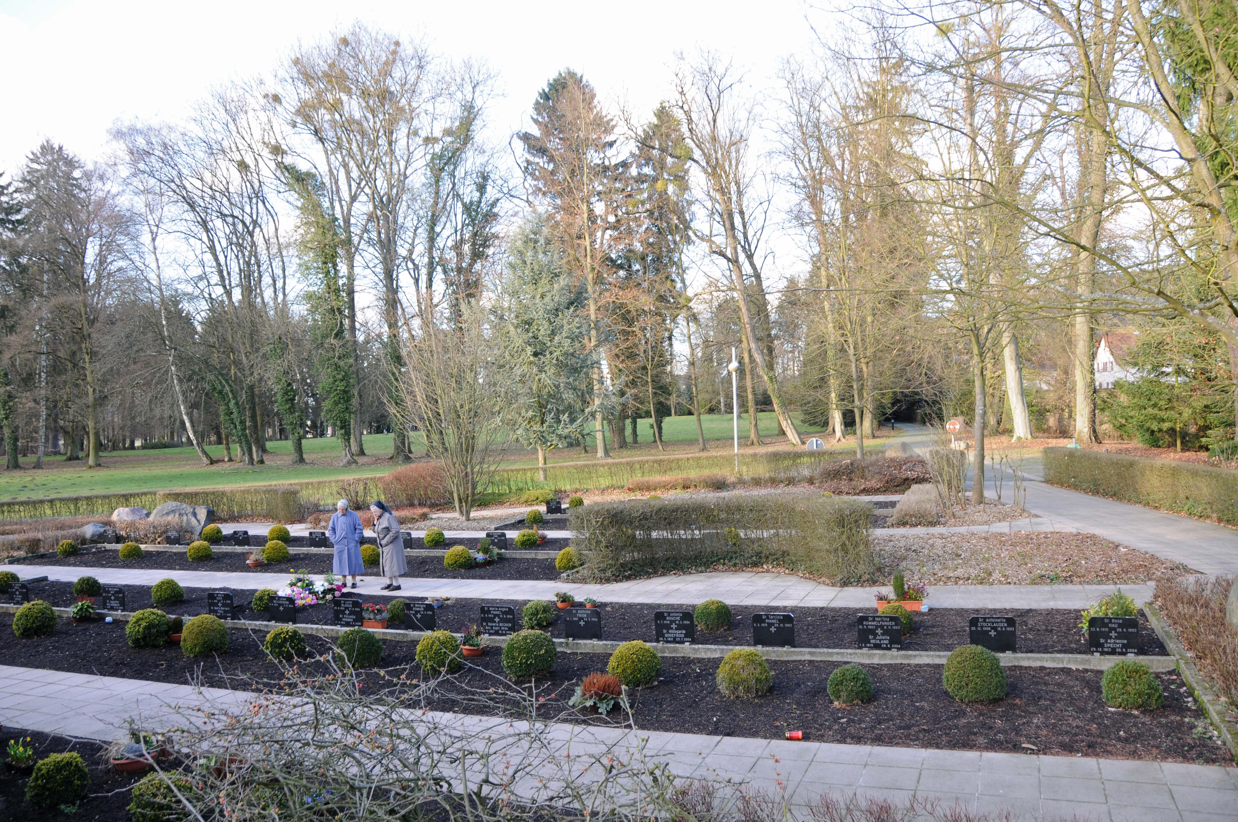 Park zu Heeschdref.